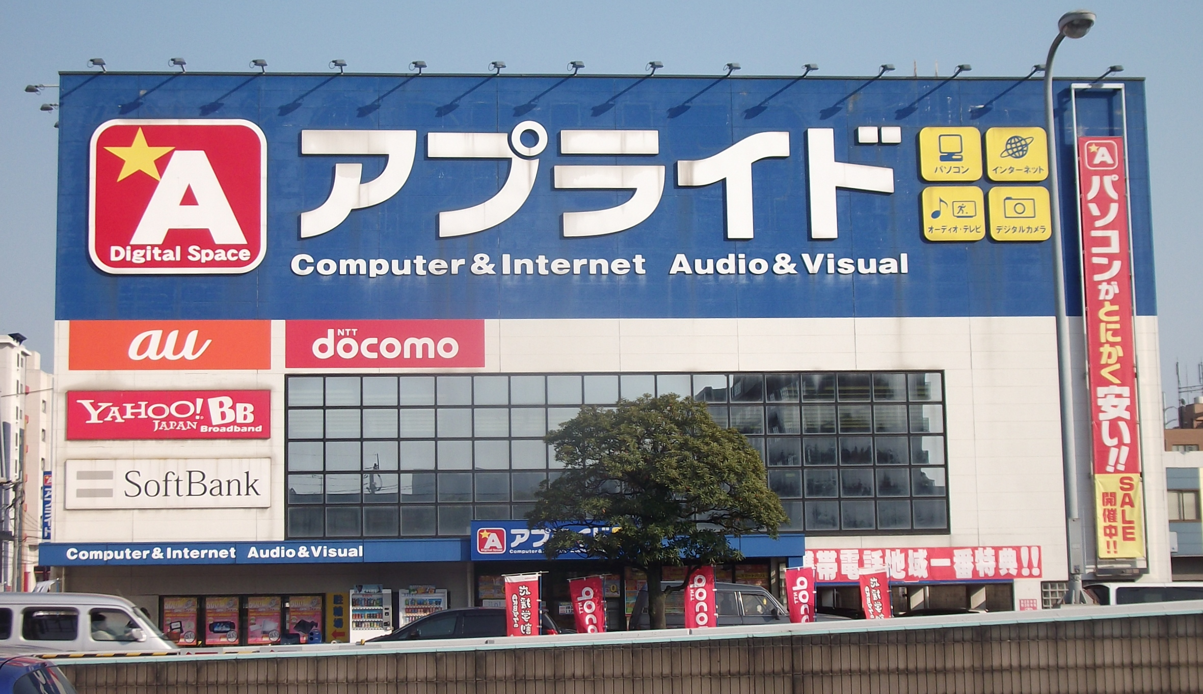 アプライド博多店（福岡市博多区豊）。